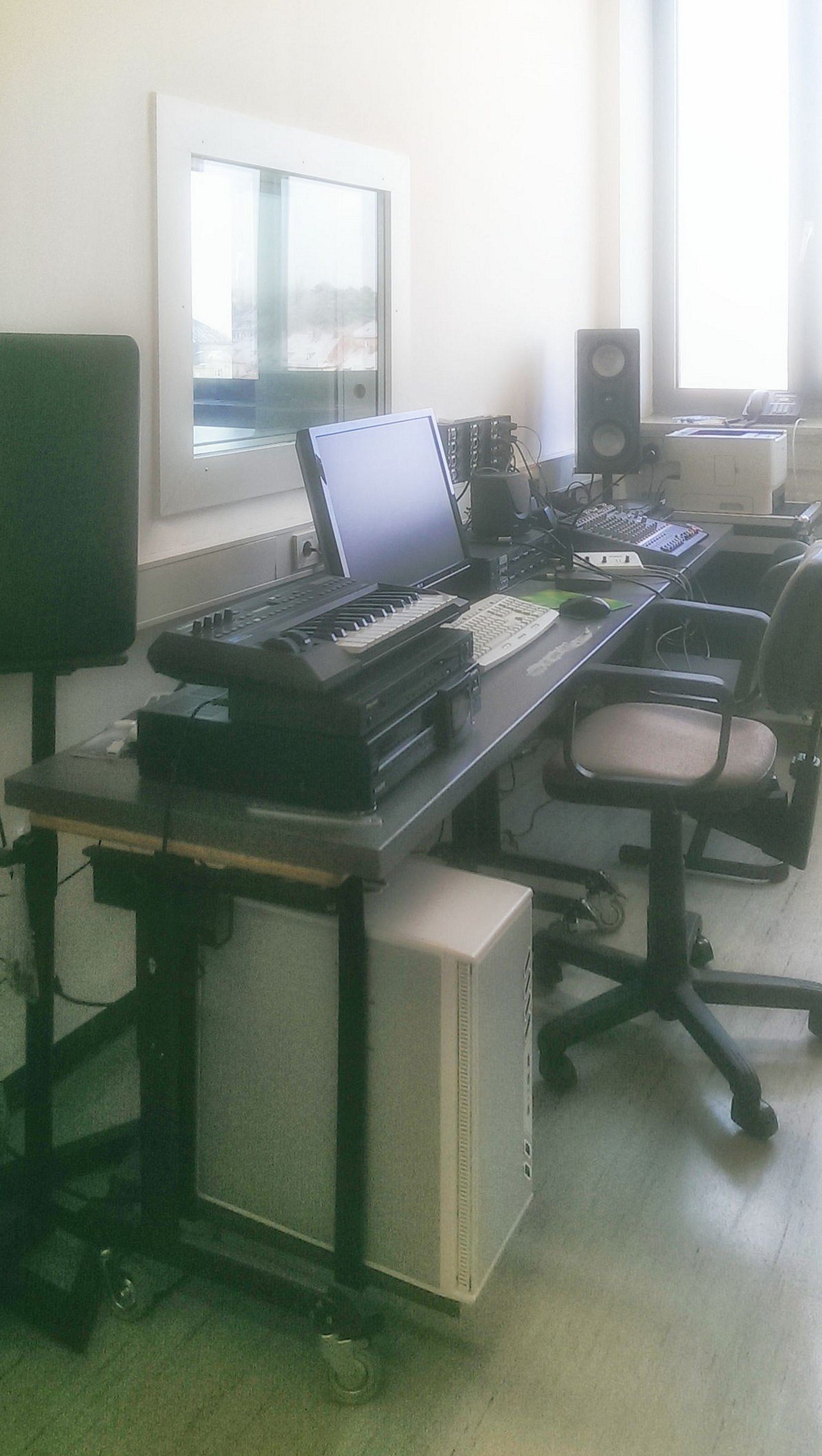 Matthias-Grünewald-Gymnasium Würzburg: Tonstudio/Regieraum